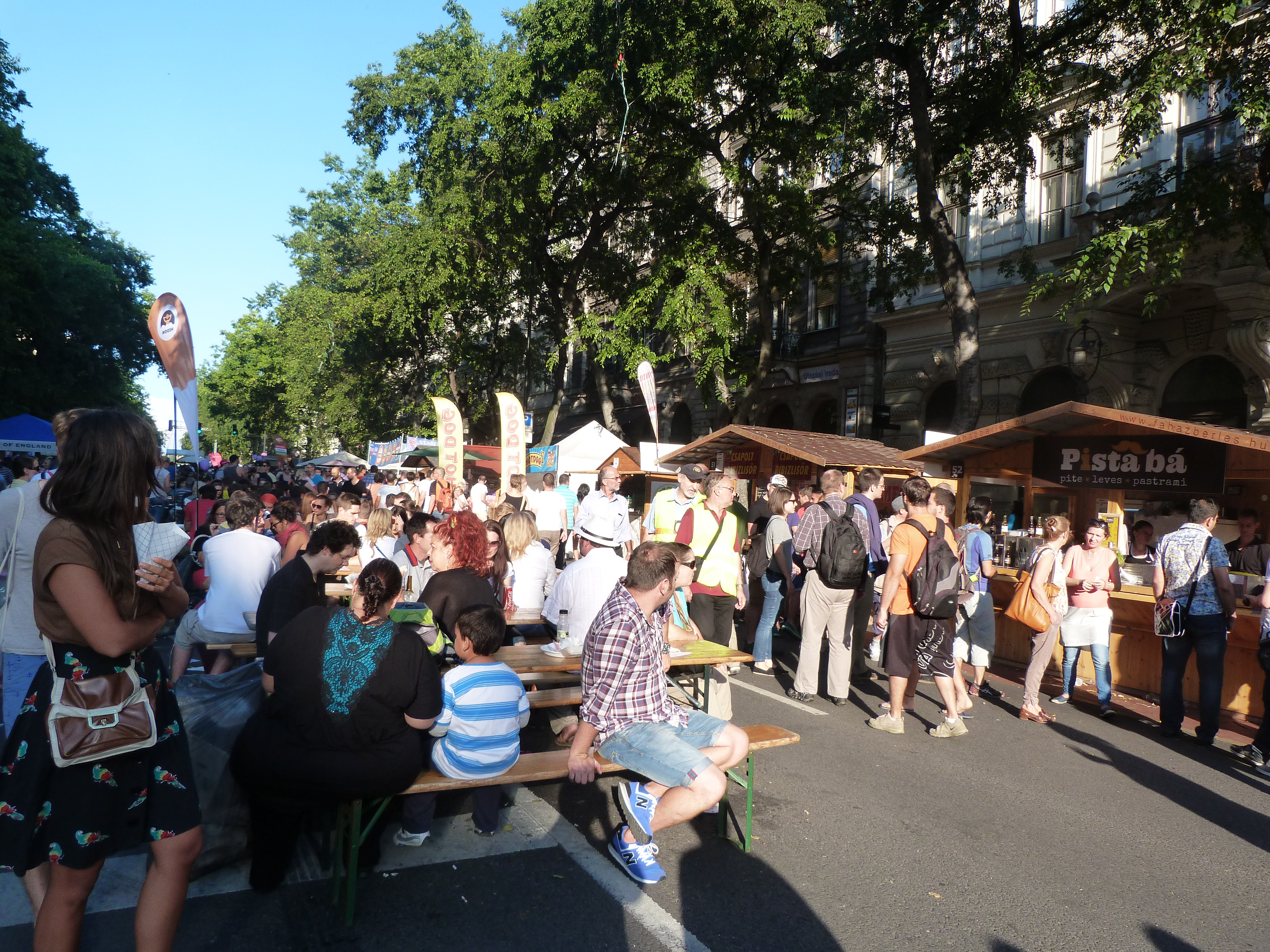 A felvétel 2014. szeptember 21-én készült Budapesten, az Andrássy úton. ©© Derzsi Elekes Andor, Budapest, 2014, A kép és filmfelvételek egészben, vagy részletekben másolását, bármilyen úton történő sokszorosítását és felhasználását a szerző ellenérték nélkül, jogutódjaira is kihatóan megengedi. Az engedély kiterjed a kereskedelmi célú hasznosításra is. Kéri azonban nevének feltüntetését a felhasználás során. A Metapolisz sorozat valamennyi képe és filmje Creative Commons alatti valamint kereskedelmi - for profit - célra is felhasználható. Ajánlott hivatkozás: Derzsi Elekes Andor: Metapolisz DVD line